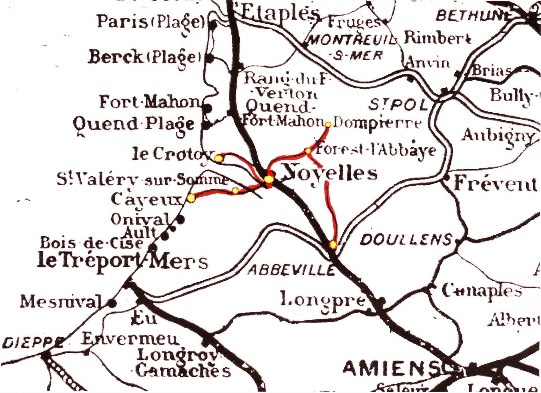 Plan du "groupe des Bains de Mer" de la Société générale des chemins de fer économiques Réseau départemental de la Somme